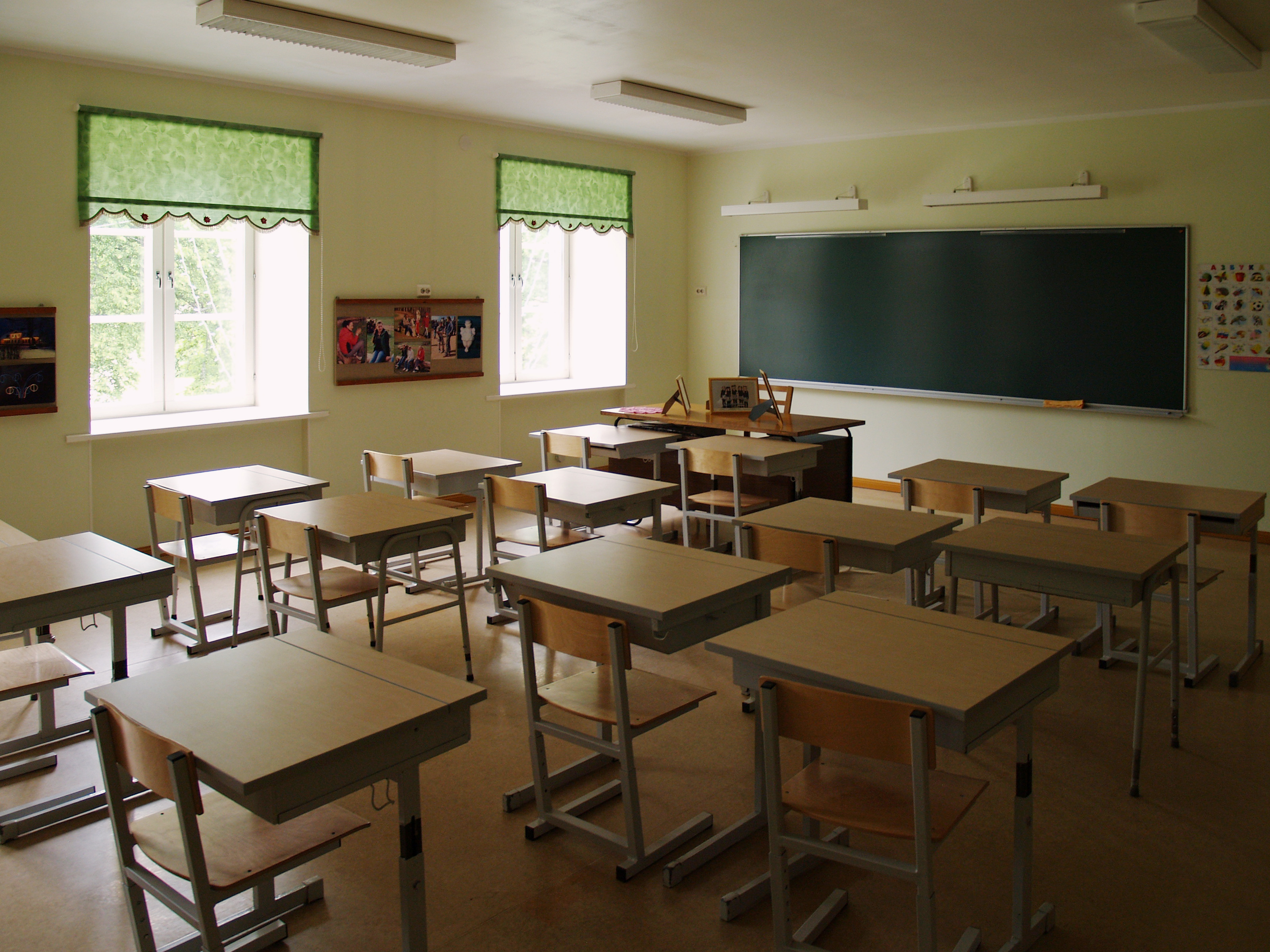 Klassiruum Suislepa koolis.